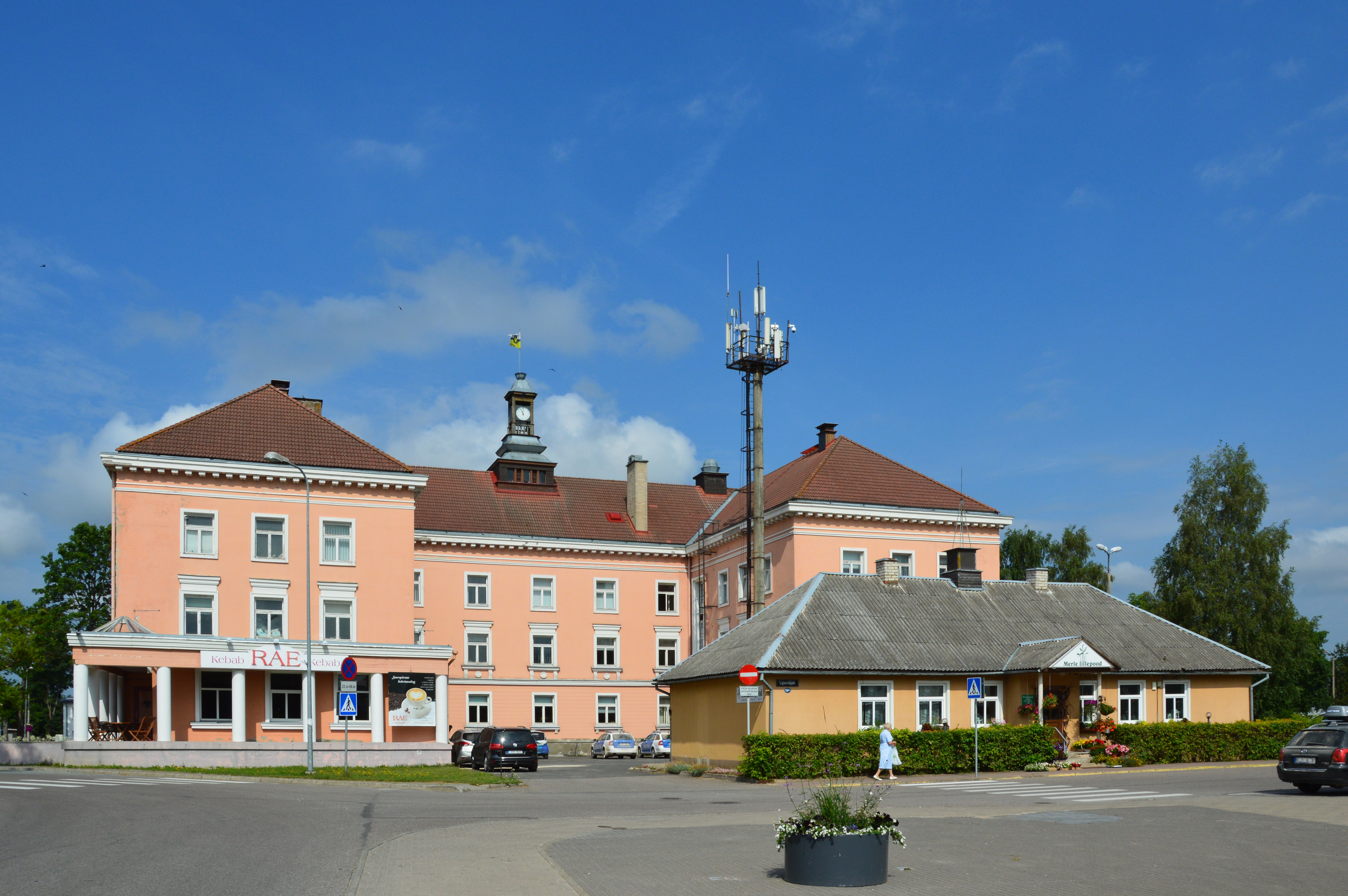 Otepää linnavalitsuse hoone